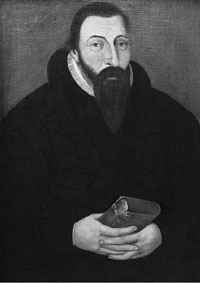 Biskop Jens Nilssøn i Oslo. NB: Dette portrettet, fra Oslo domkirkes samling, er gjengitt en rekke steder med påstand om at det forestiller Jens Nilssønn. Førsteantikvar Bernt C. Langes undersøkelser tyder på at dette er feil, og at det i stedet må antas å forestille Jens Nilssønns etterfølger i bispestolen; Anders Bendssøn Dall.